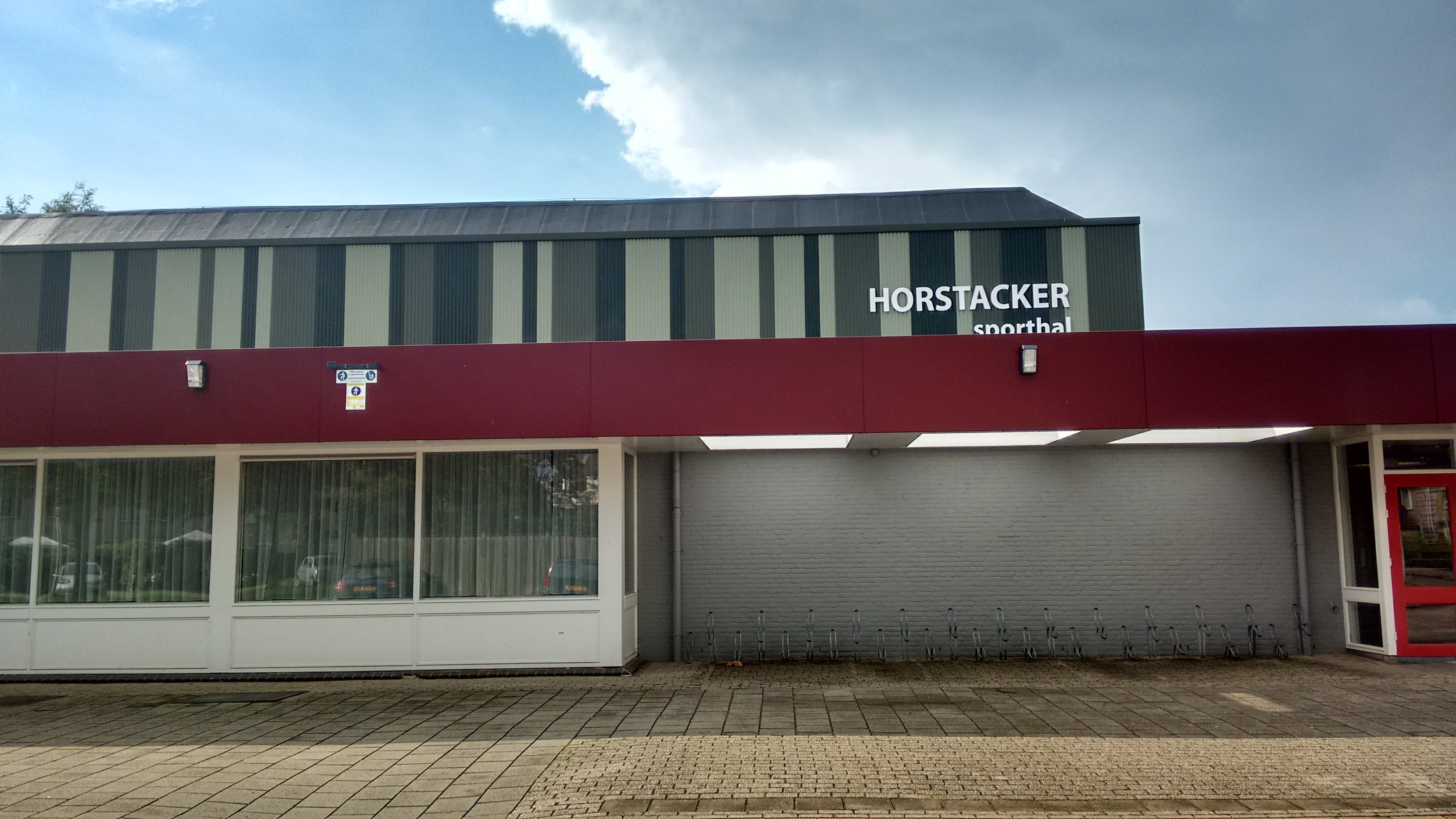 Sporthal Horstacker, Lindenholt Nijmegen